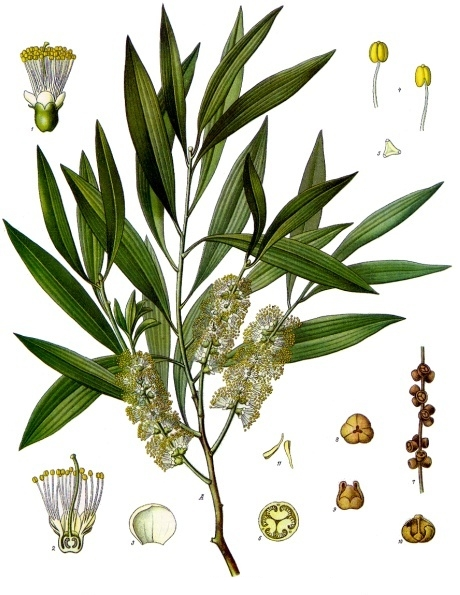 Myrtenheide. A blühender Zweig, natürl. Grösse; 1 Blüthe, vergrössert; 2 dieselbe im Längsschnitt, desgl.; 3 Kronblatt, desgl.; 4 Staubgefässe, desgl.; 5 Pollen, desgl.; 6 Fruchtknoten im Querschnitt, desgl.; 7 Fruchtähre, natürl. Grösse; 8, 9 Fruchtkapsel, desgl.; 10 dieselbe geöffnet, desgl.; 11 Samen, desgl.